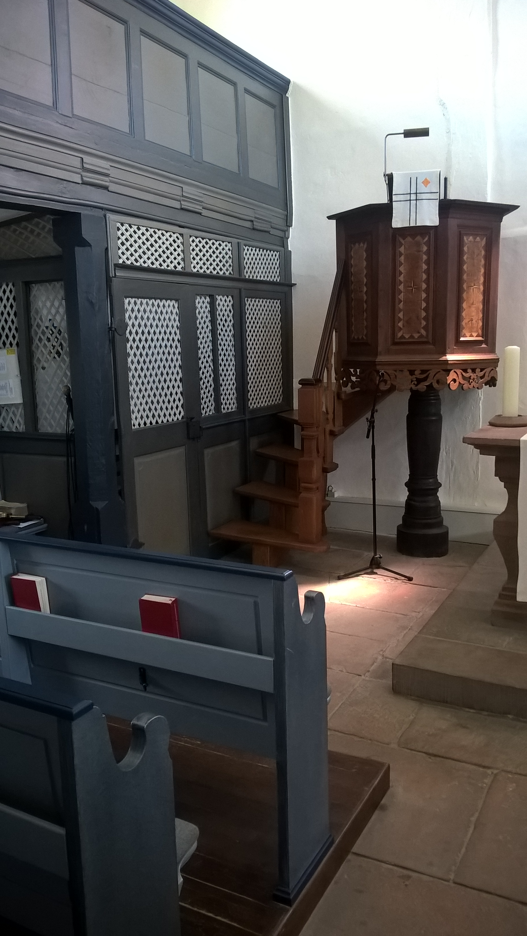 Evangelische Kirche Runzhausen (Gladenbach), Landkreis Marburg-Biedenkopf, Hessen, Deutschland